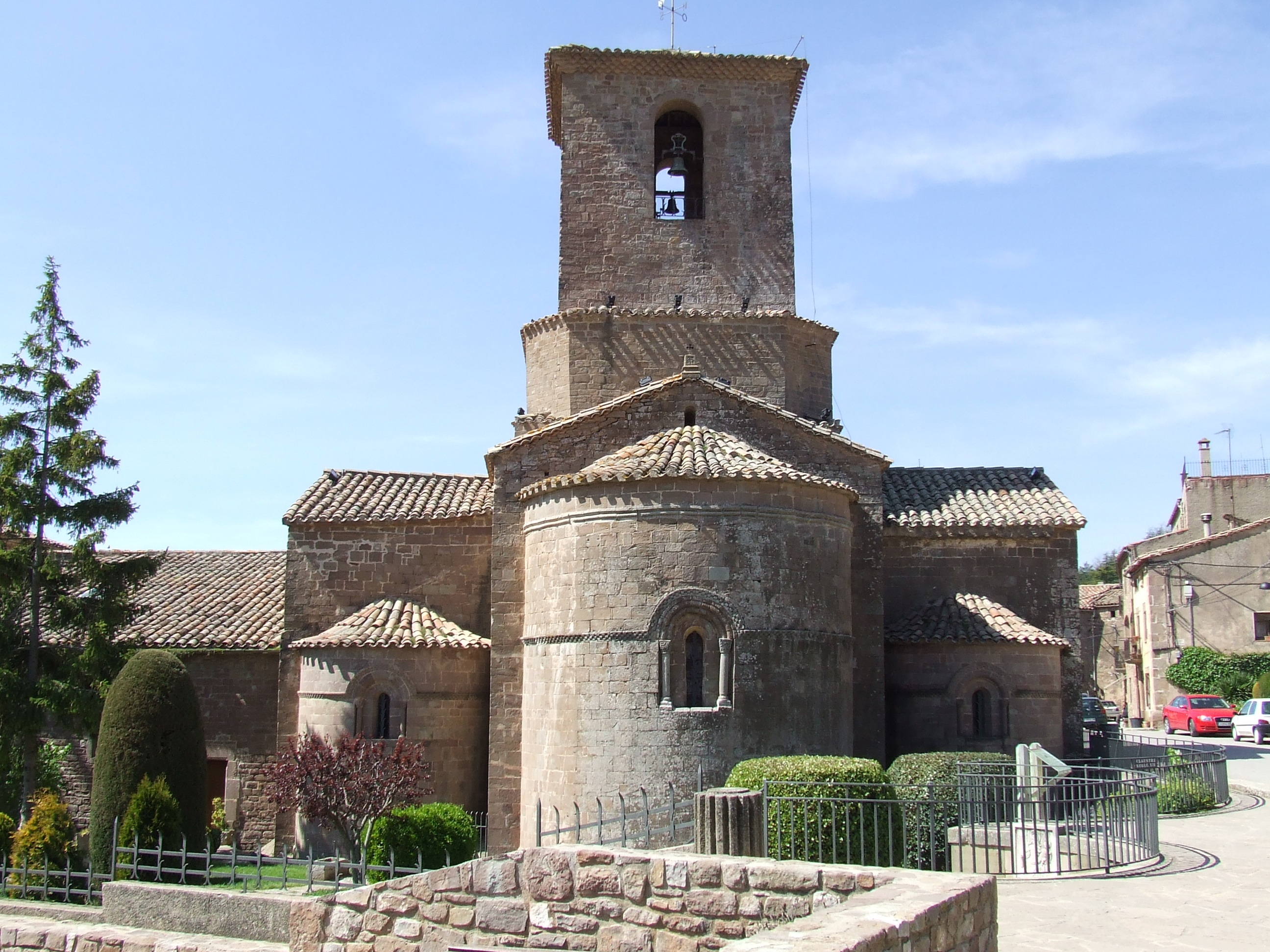 Capçalera de Santa Maria de l'Estany (Moianès)